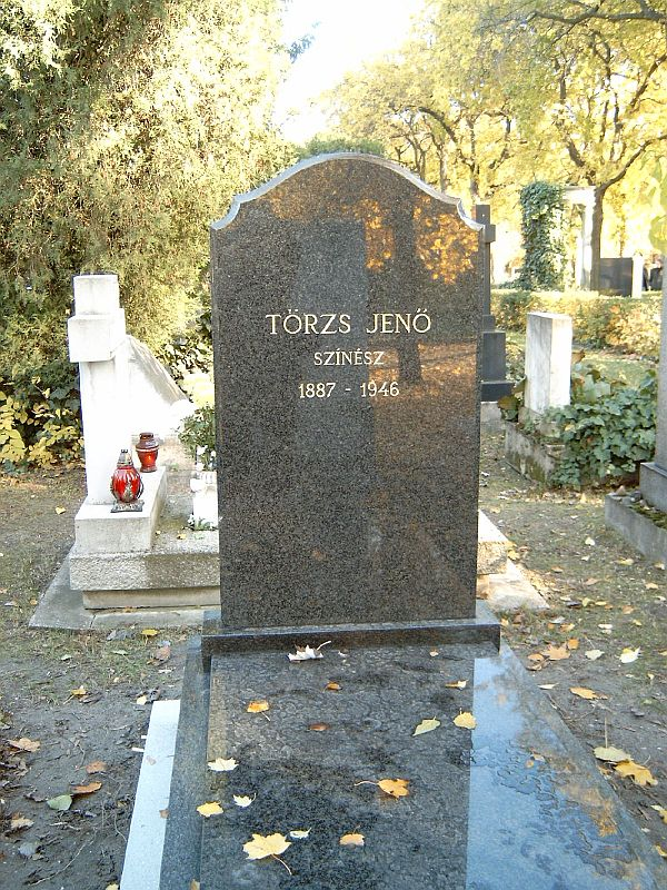 Törzs Jenő sírja Budapesten. Kerepesi temető: 34-2-121.